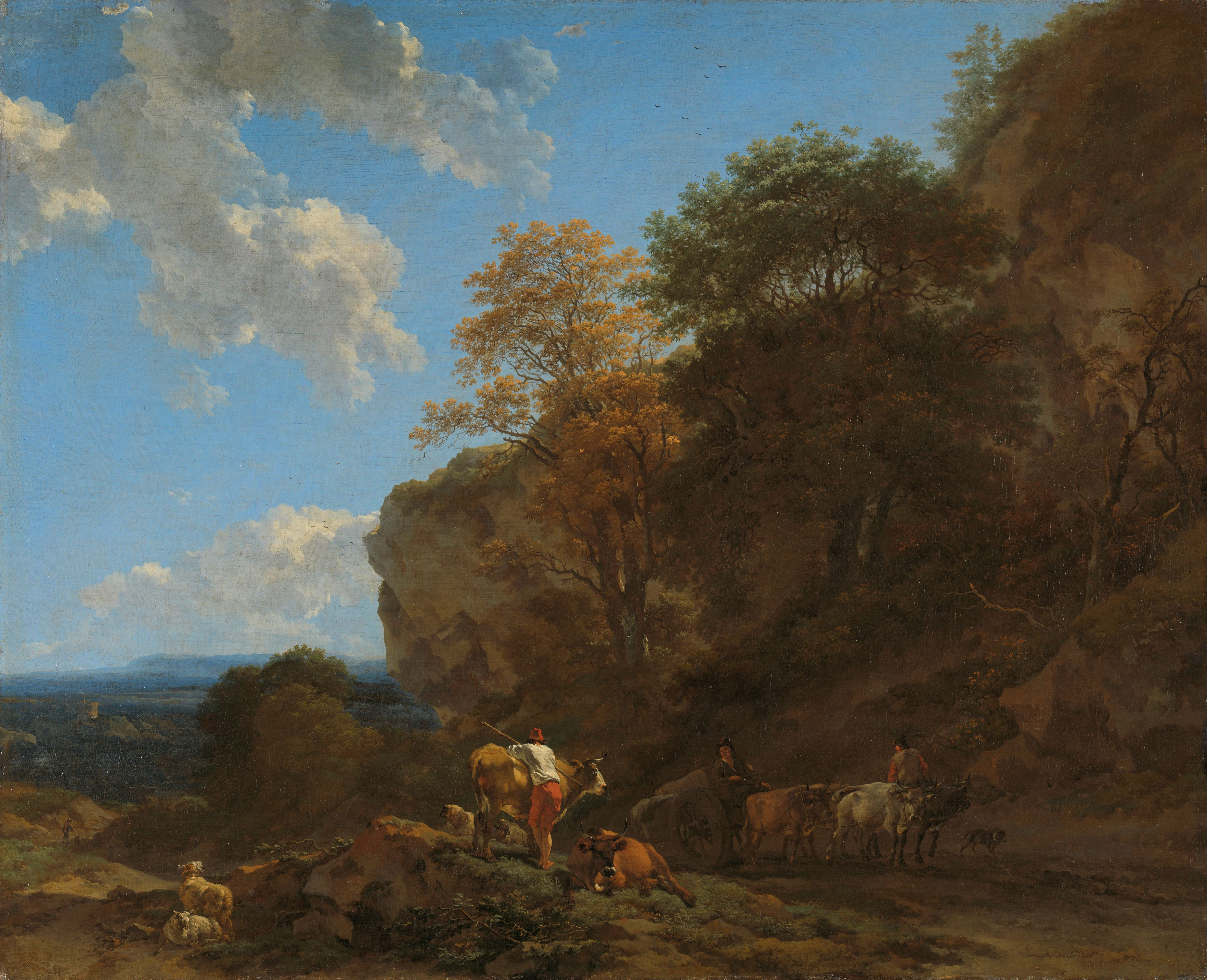 Italiaans landschap. Op de weg staat een kar getrokken door ossen, langs de weg een herder met vee.; Nicolaes Pietersz Berchem (ca. 1621–1683), olieverf op doek, 1650–1683